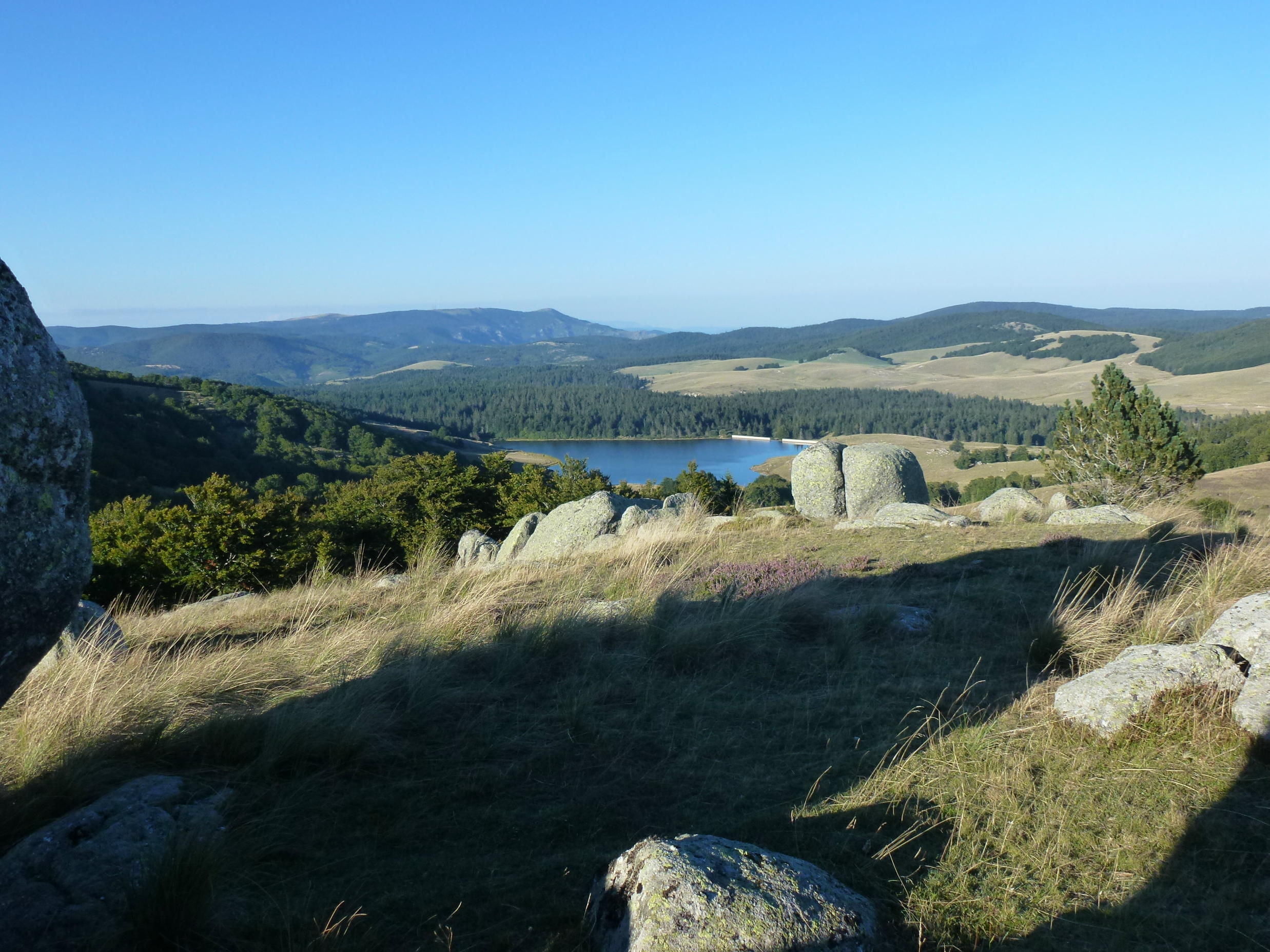 Incontournable site à ne manquer sous aucun prétexte.